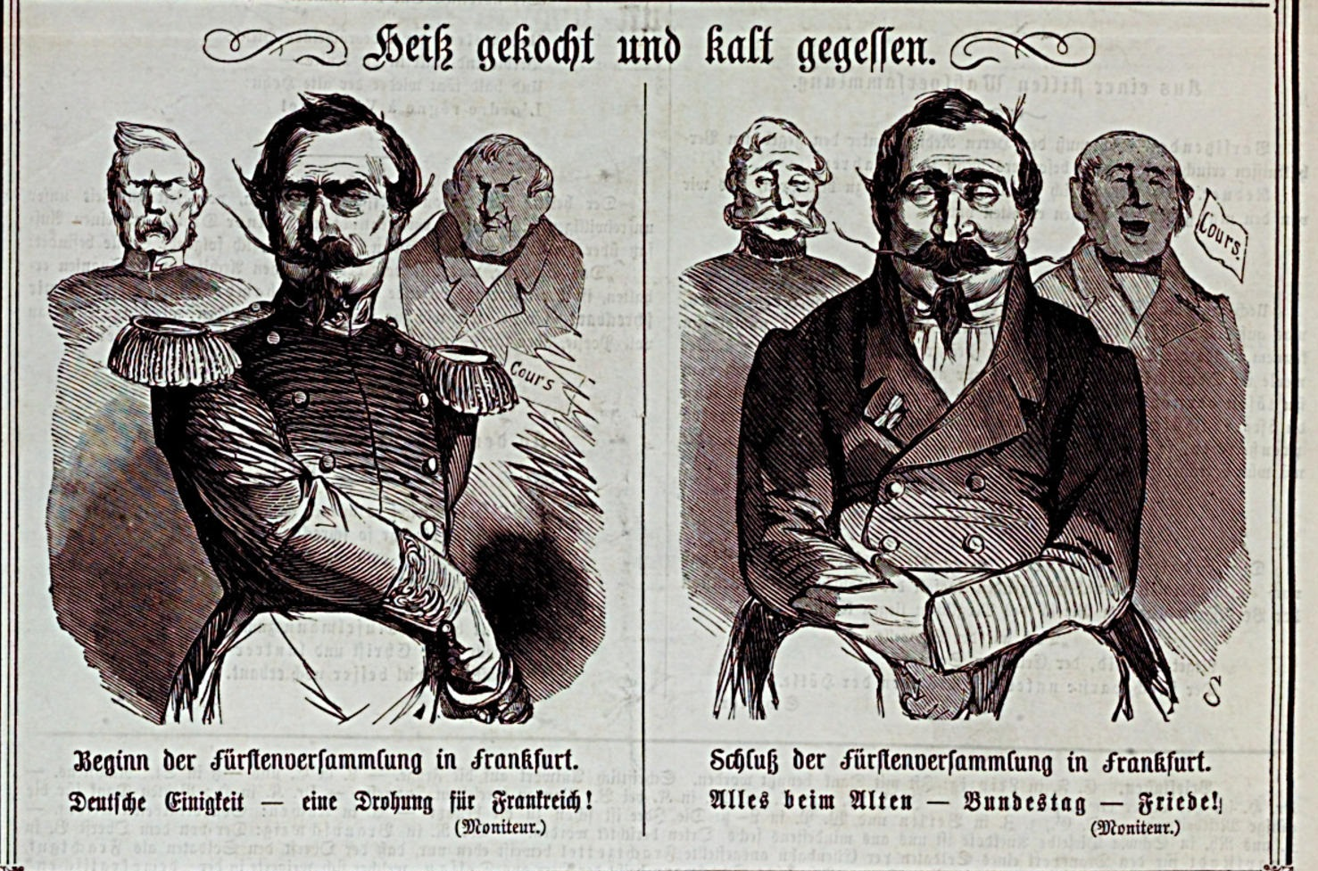 Karikatur des Kladderadatschs auf den Füstentag in Frankfurt